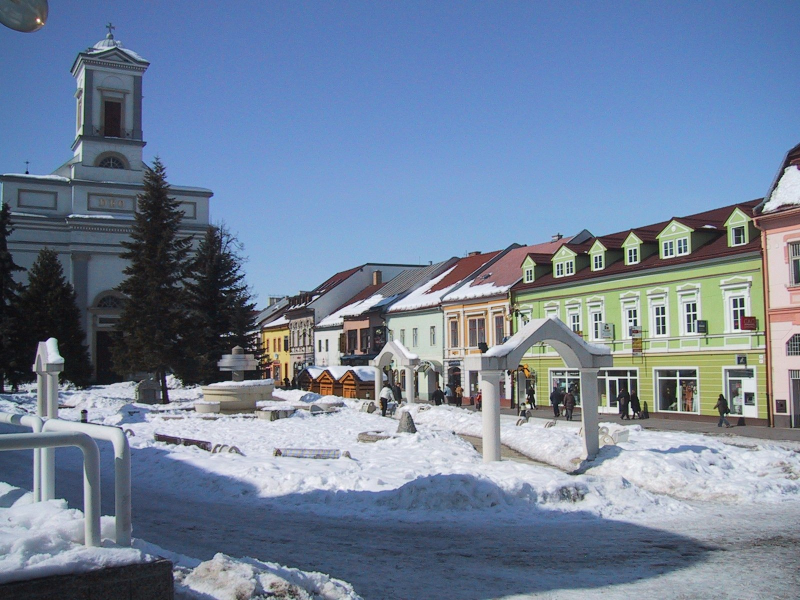 Stadscentrum Poprad - Slovakije. Zelfgemaakte foto